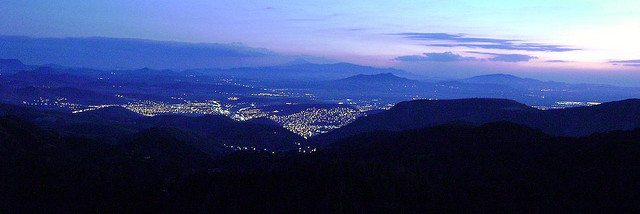 Pachuca desde las ventanas